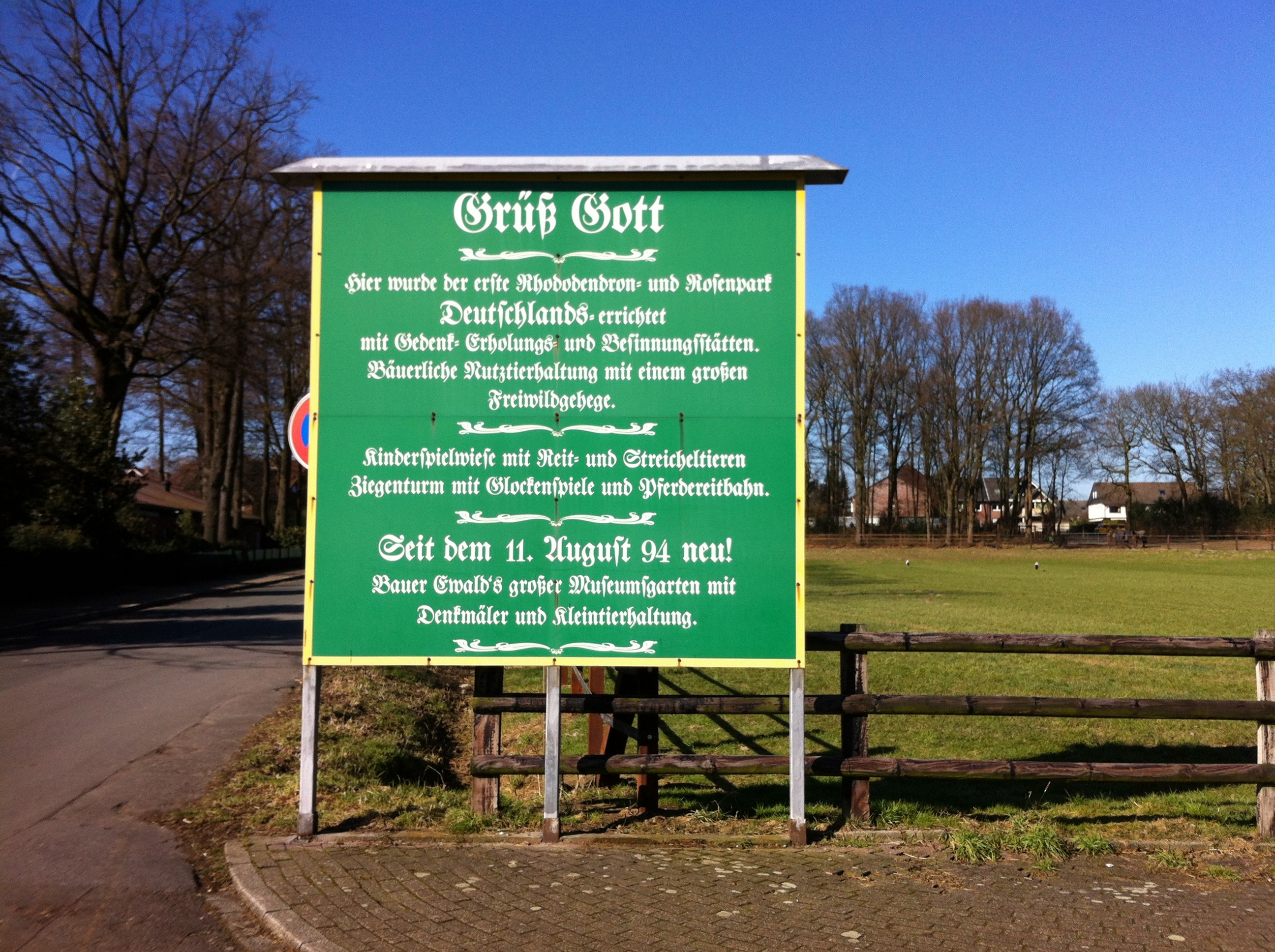 Prickings-Hof in Haltern am See